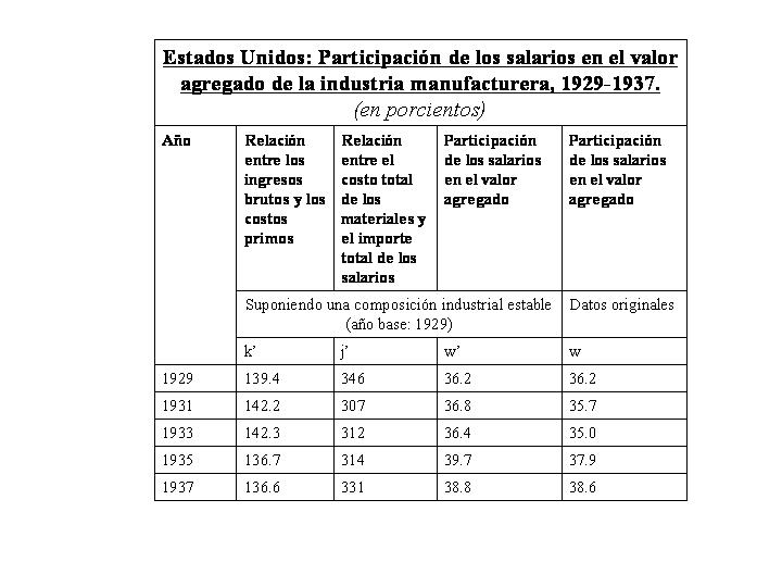 Estados Unidos Participación de los salarios en el valor agregado de la industria manufacturera, 1929-1937. Extraído de la obra de Michal Kalecki, Teoría de la dinámica económica.